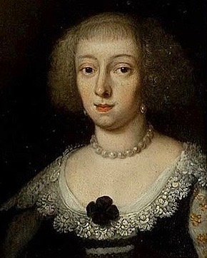 Claude-Françoise de Lorraine